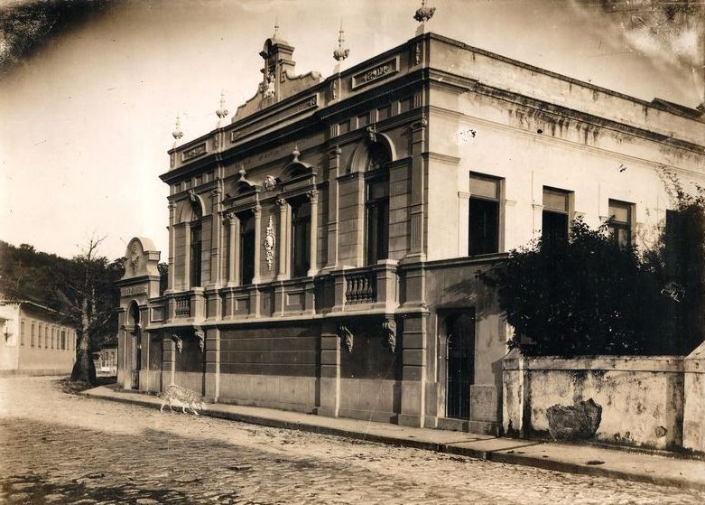 Fachada da residência de Antônio Parreiras, atual Museu Antônio Parreiras, vista a partir da Rua Visconde de Moraes. Não há janelas para a rua no porão (atual pavimento térreo do Museu Antônio Parreiras). A Rua Tiradentes é calçada de pedras mas ainda não há trilhos de bonde. Há árvores plantadas fora da calçada. Ao fundo à direita, casas baixas. Em frente à casa, imagem difusa de um cão em movimento. Fotografia de autoria desconhecida, tirada em 1907.